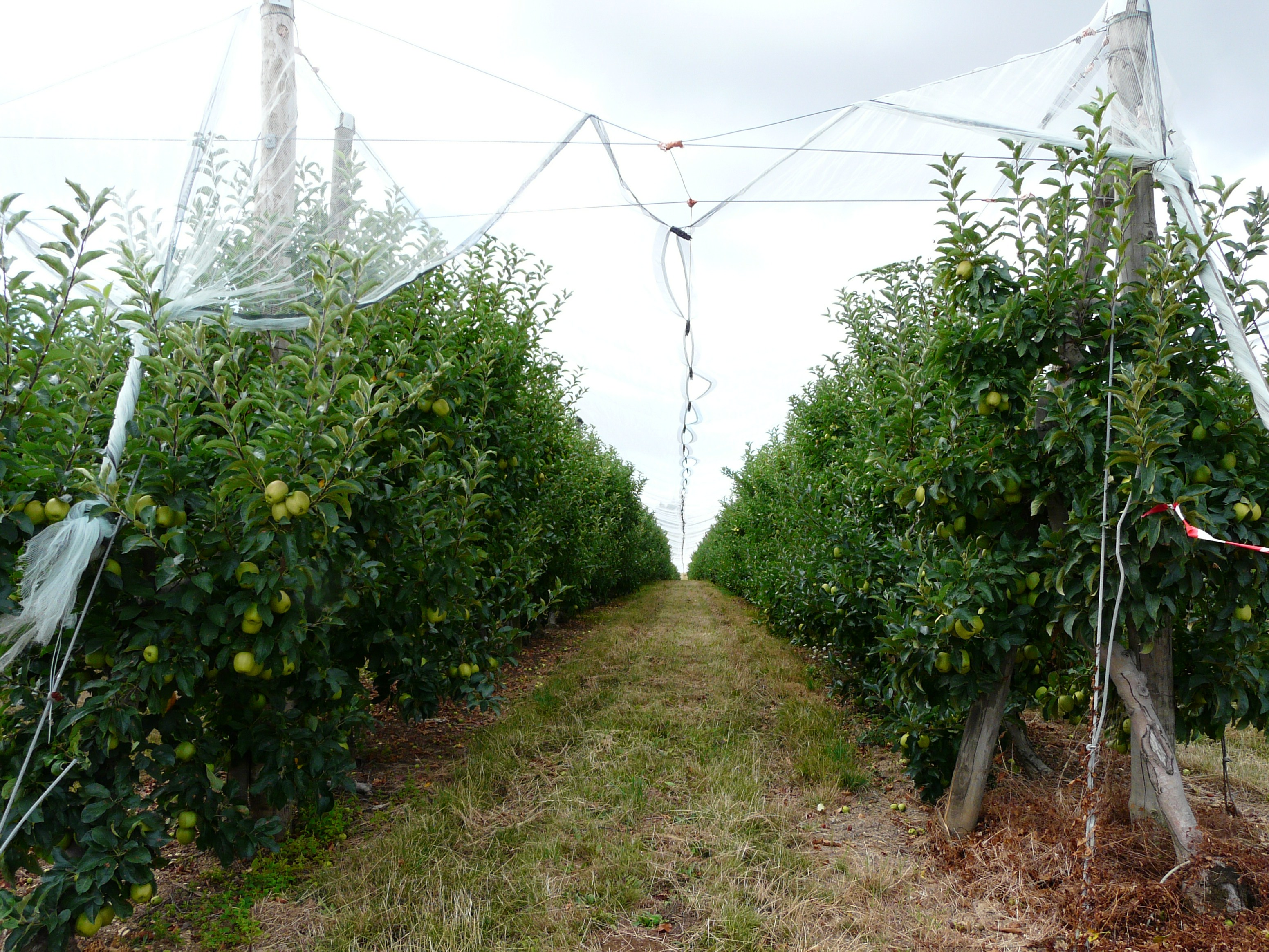 Plantation de pommiers, près du lieu-dit les Bichets, en bordure de la route départementale 5E3, Juillac, Corrèze, France.